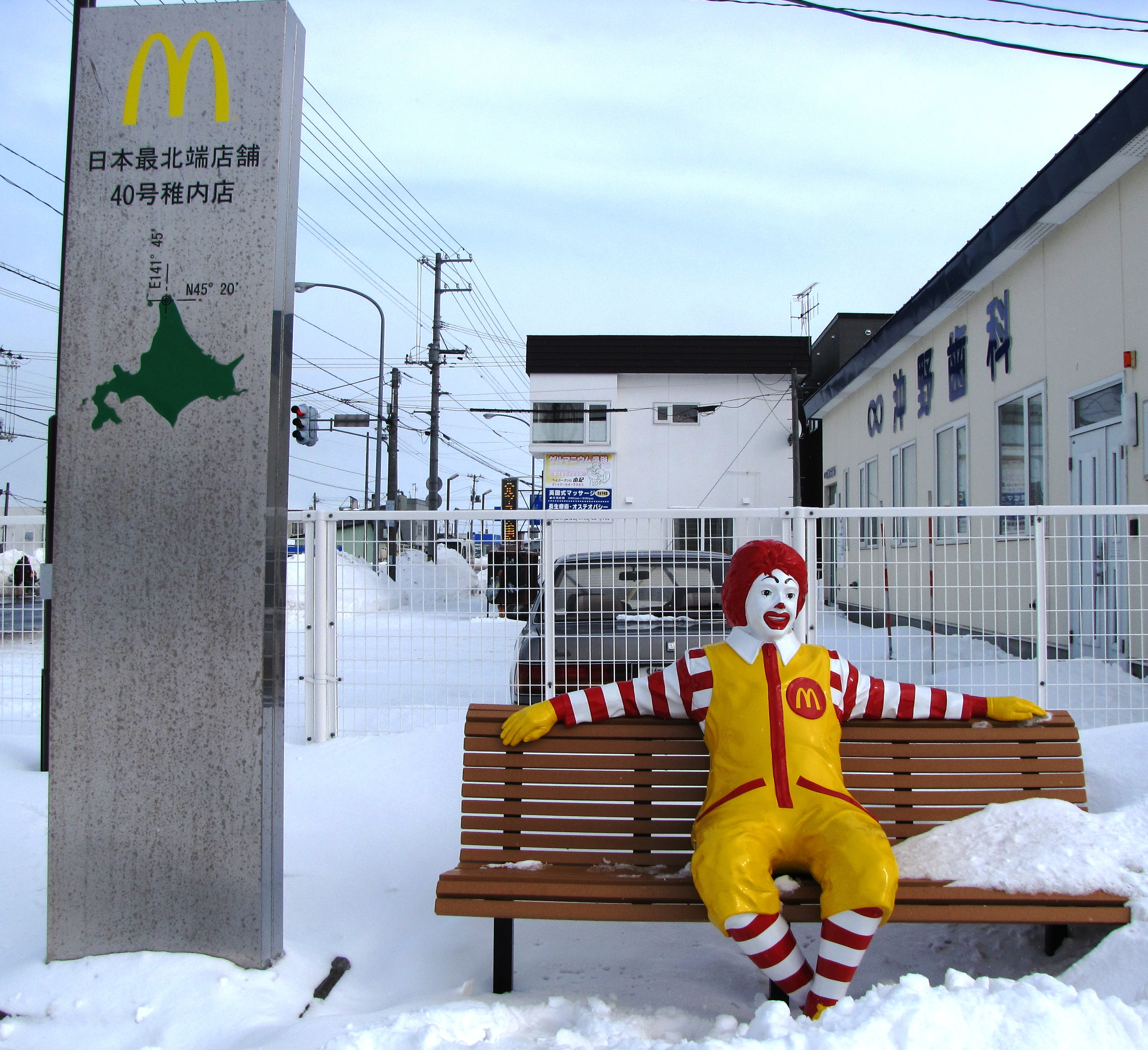 日本マクドナルド最北端店舗「40号稚内店」敷地内メモリアルオブジェ。